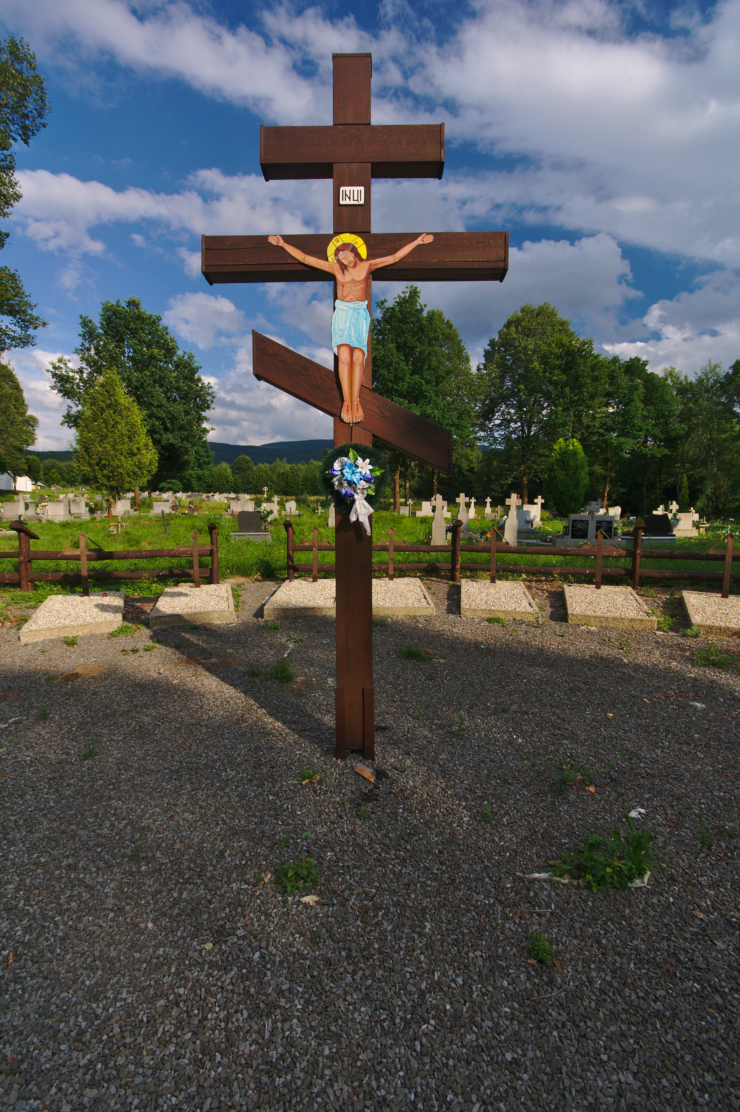 Kríž na vojenskom cintoríne, Zboj, okres Snina